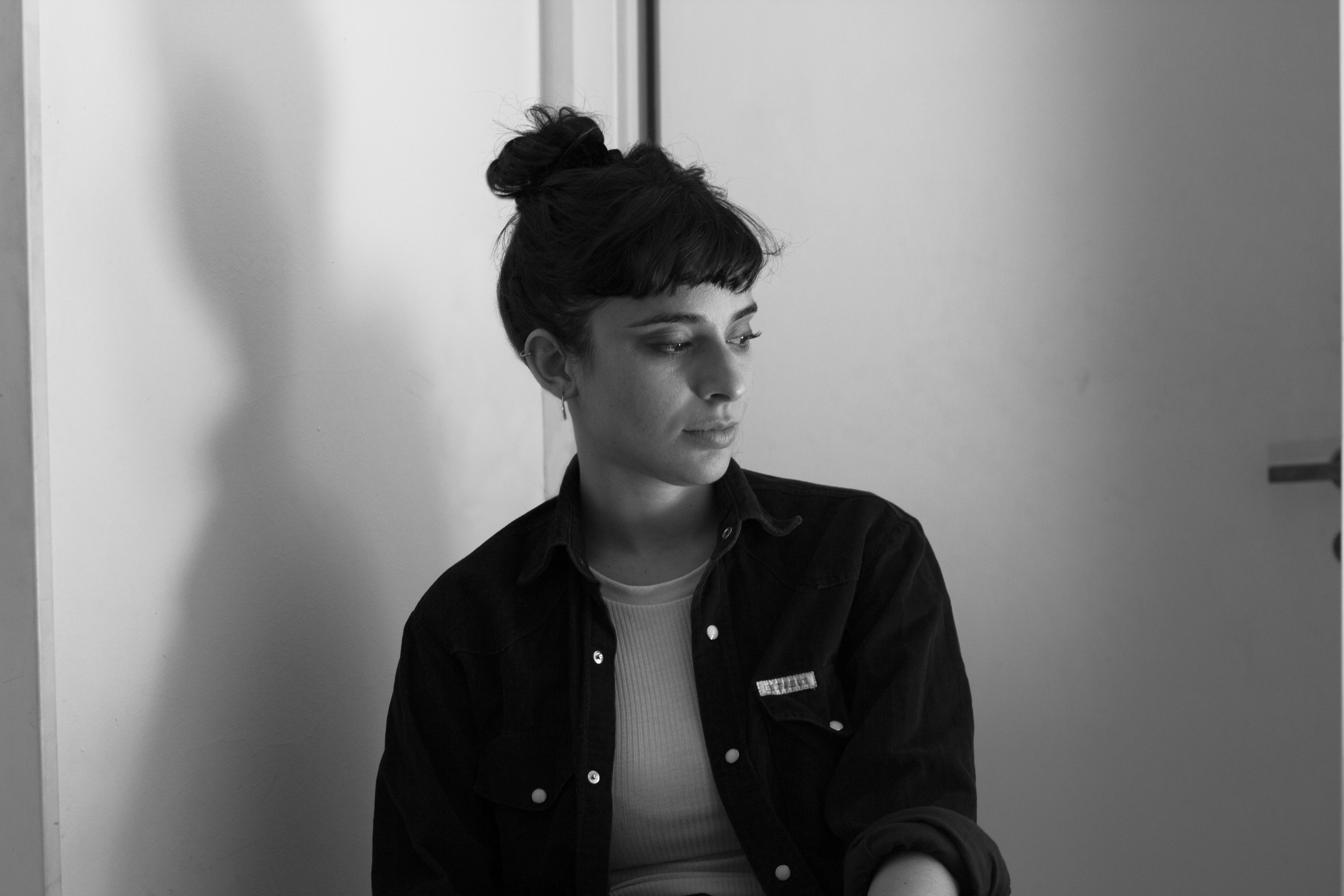 Foto directora de cine Lucía Garibaldi